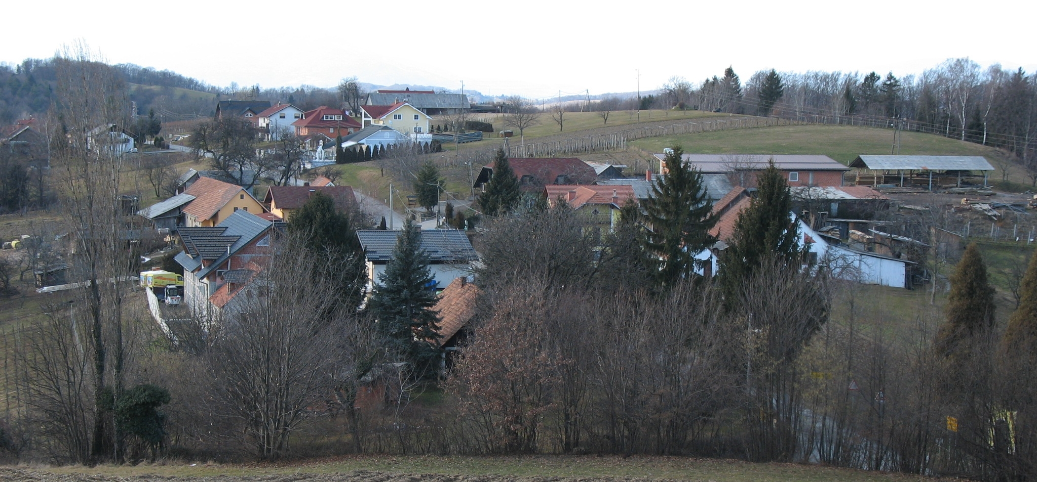 Pogled na vas Dolge Njive